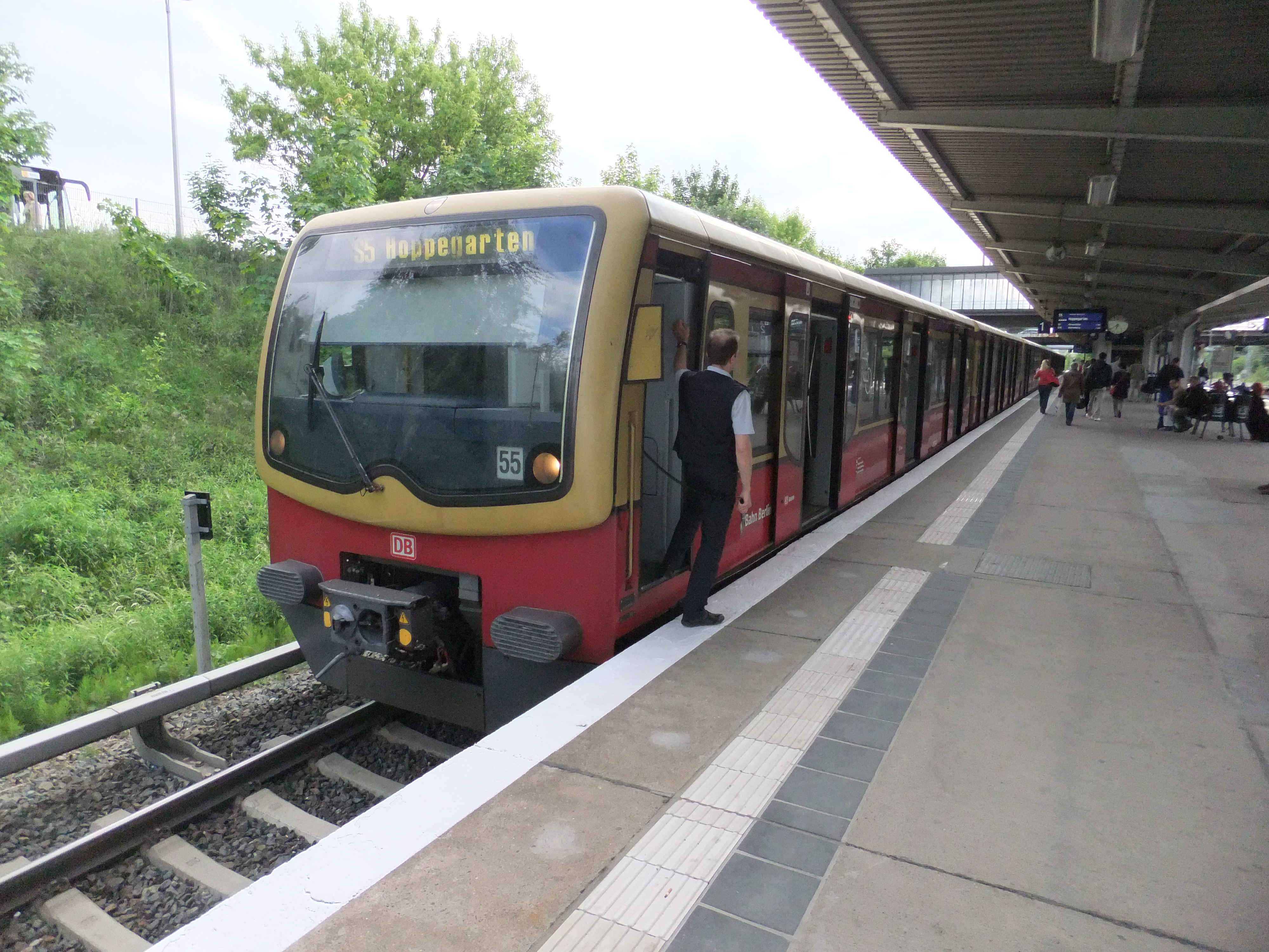 DBAG-Baureihe 481 der S-Bahn Berlin auf der Linie S5 im Bahnhof Berlin-Friedrichsfelde Ost